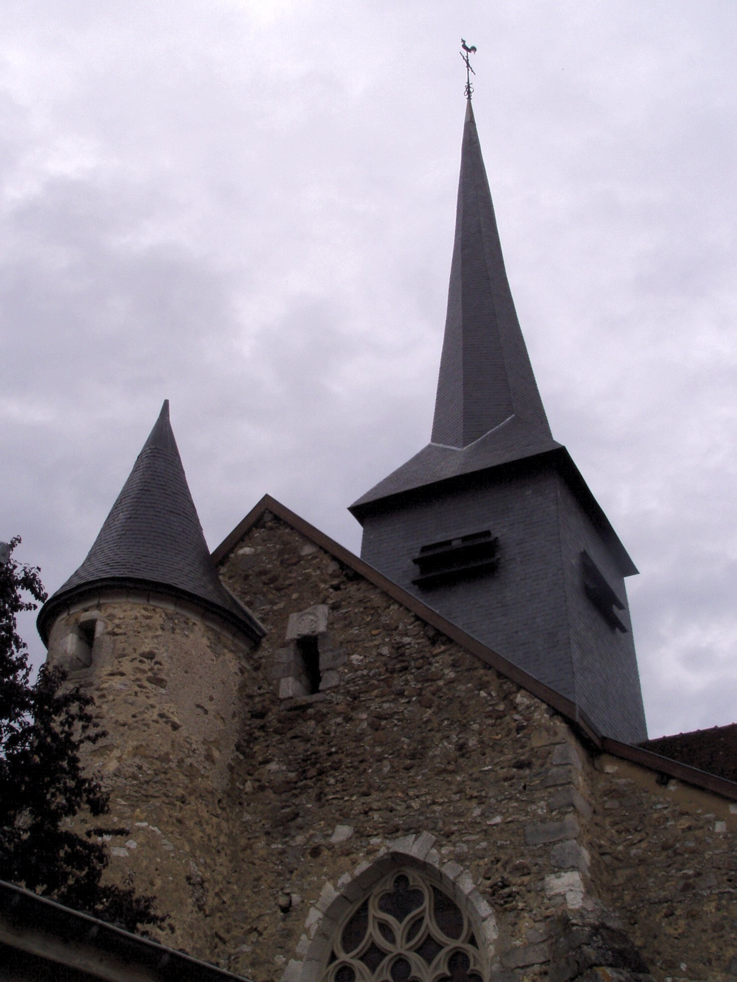 Photographie du clocher tors de l'église d'Ã‰toges (Marne), prise par Accrochoc, le 24 septembre 2006.